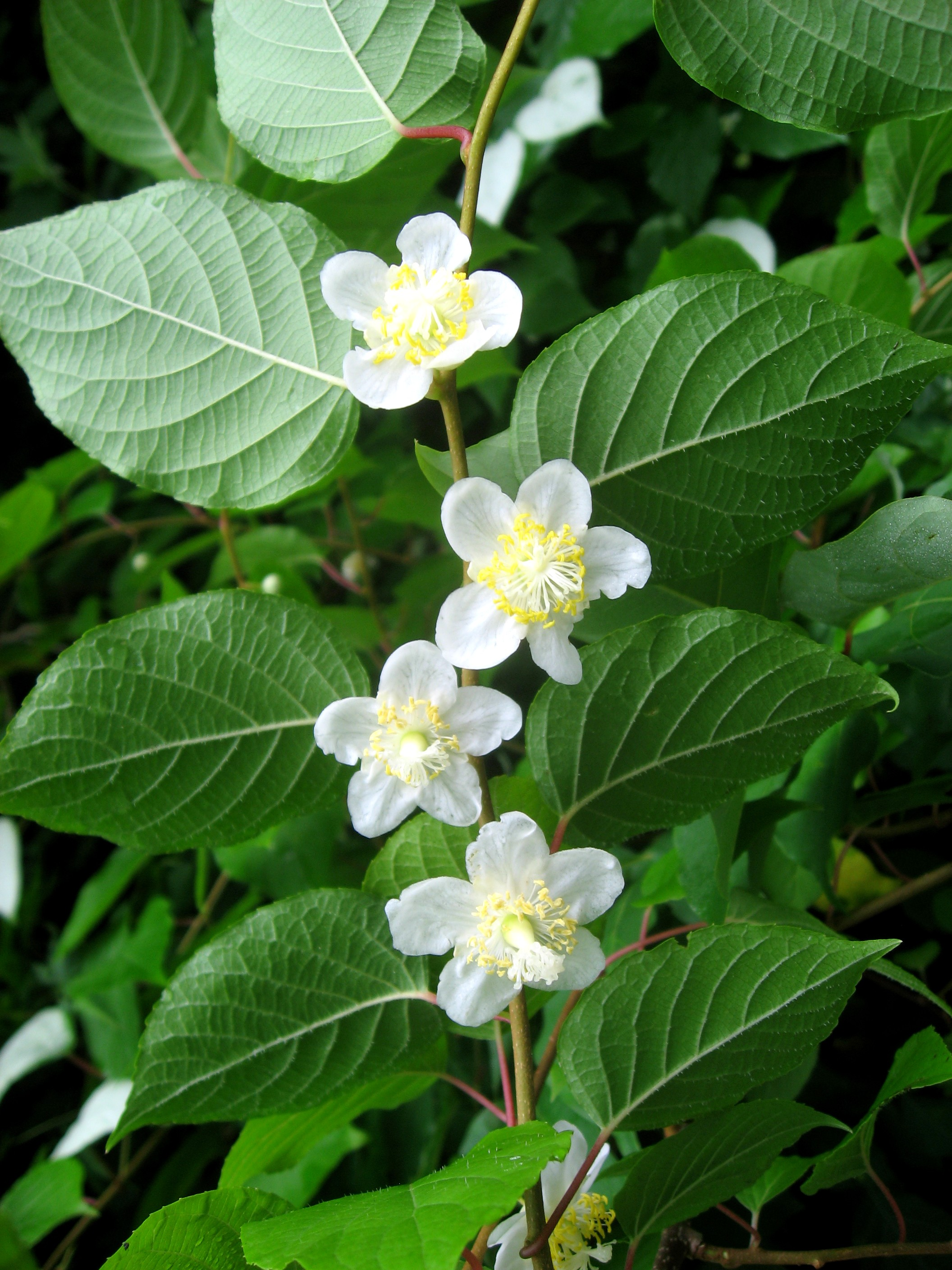 マタタビの両性花 福島県会津地方